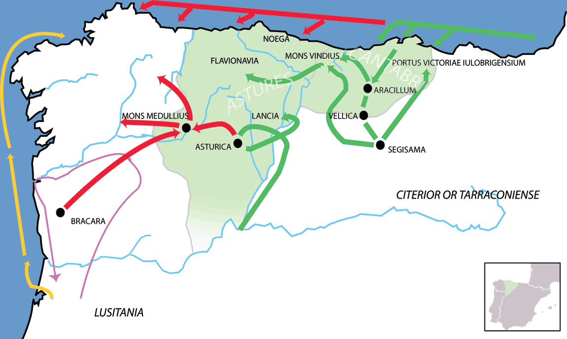 Map of the Roman conquest of the northern territiories of Spain inhabited by the Cantabri and the Astures. Based on classical sources (Florus, Orosius) and: Fernandez Ochoa, C: Asturias en la época romana. Madrid, 1982 Fernández Ochoa, C: Roma y la conquista del Norte Peninsular. La Nueva España, 1990 Gonzalez Echegaray, J: Cantabria a través de su historia. Santander, 1979 Marcos García, M.A.: Un enfoque crítico sobre los textos antiguos de la Cantabria romana. *Studia Histórica, vol VI, 1988. Martino, E.: Roma contra cántabros y astures. Nueva lectura de las fuentes. Santander, 1982 Rodriguez Colmenero, A: Augusto e Hispania. Conquista y organización del Norte peninsular. Bilbao, 1979 Syme, R: The Conquest of North-West Spain. Legio VII Gemina. 1970